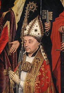 Jean Chevrot (detail)